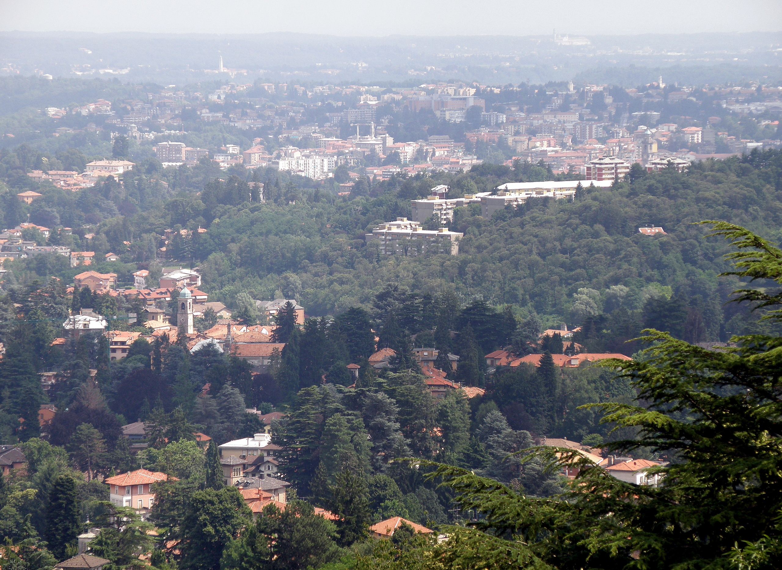 Varèse (Lombardie). Vue sur l'agglomération à partir du bourg de Santa Maria del Monte, perché sur le Campo dei Fiori (montagne située au nord-ouest de Varèse). A l'avant-plan, bourg de San Ambrogio (appartenant à la comm. de Varèse). Le haut clocher blanc dans le lointain à gauche est sans doute celui de l'église de Vedano Olona, à environ 11 km de notre point de vue. Le complexe de bâtiments de couleur claire que l'on distingue sur la ligne d'horizon à droite pourrait être (sous toutes réserves) le Sanctuaire Sainte-Marie-des-Miracles (en it. Santuario della Beata Vergine dei Miracoli) de Saronno, sis à une trentaine de kilomètres à vol d'oiseau. Nous regardons vers le sud-sud-est.